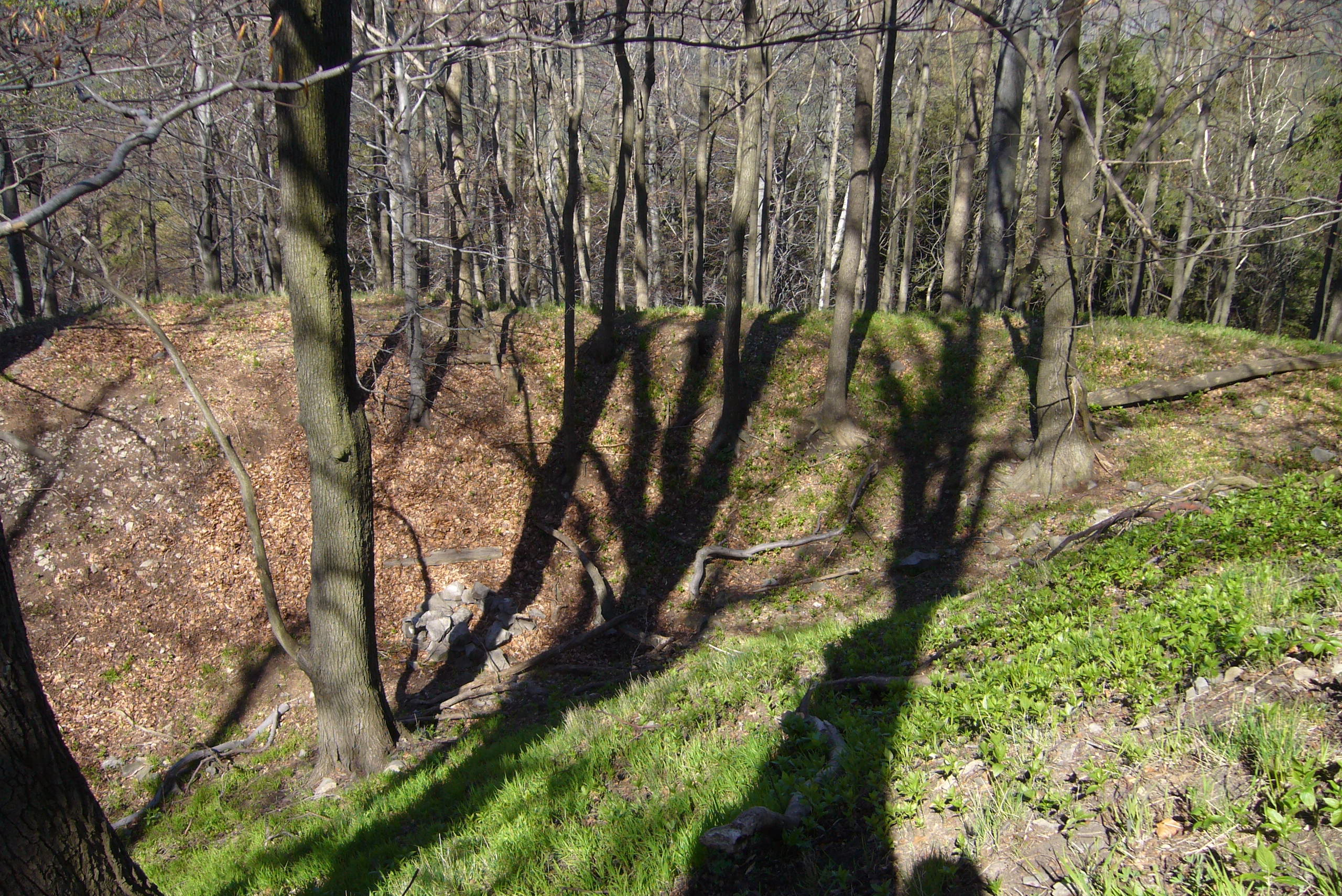 Falkenburk – příkop